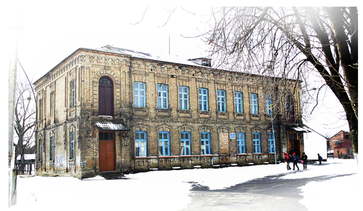 Споруда школи (мур.), Ковель, вул. Брестська, 23